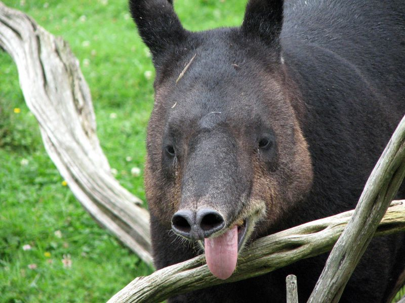 Tapirus terrestris